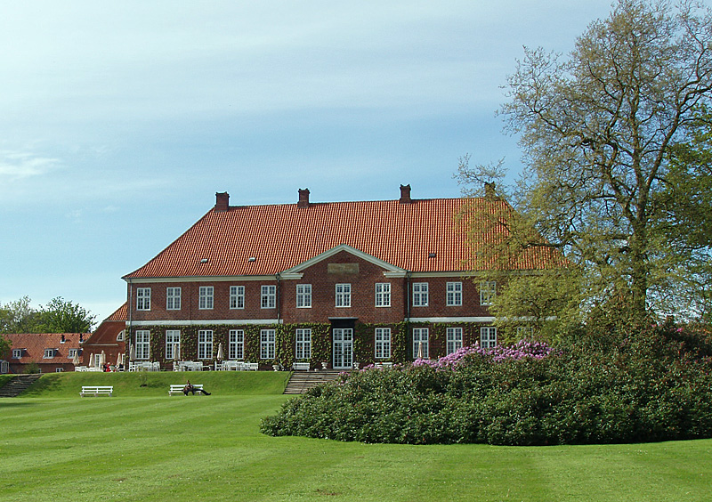 Herregården Hindsgavl set fra havesiden. Ligger ved Lillebælt og Middelfart , Denmark